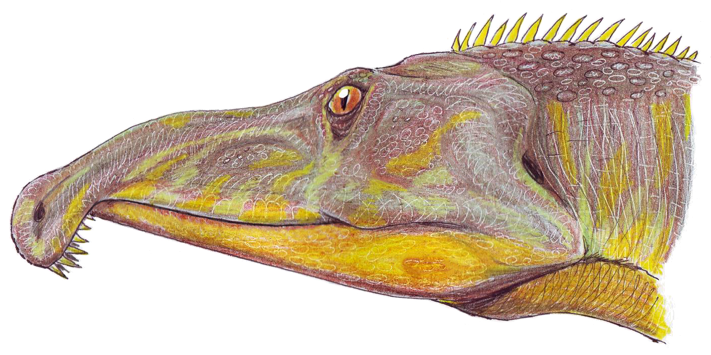 Chasmatosaurus yuani head